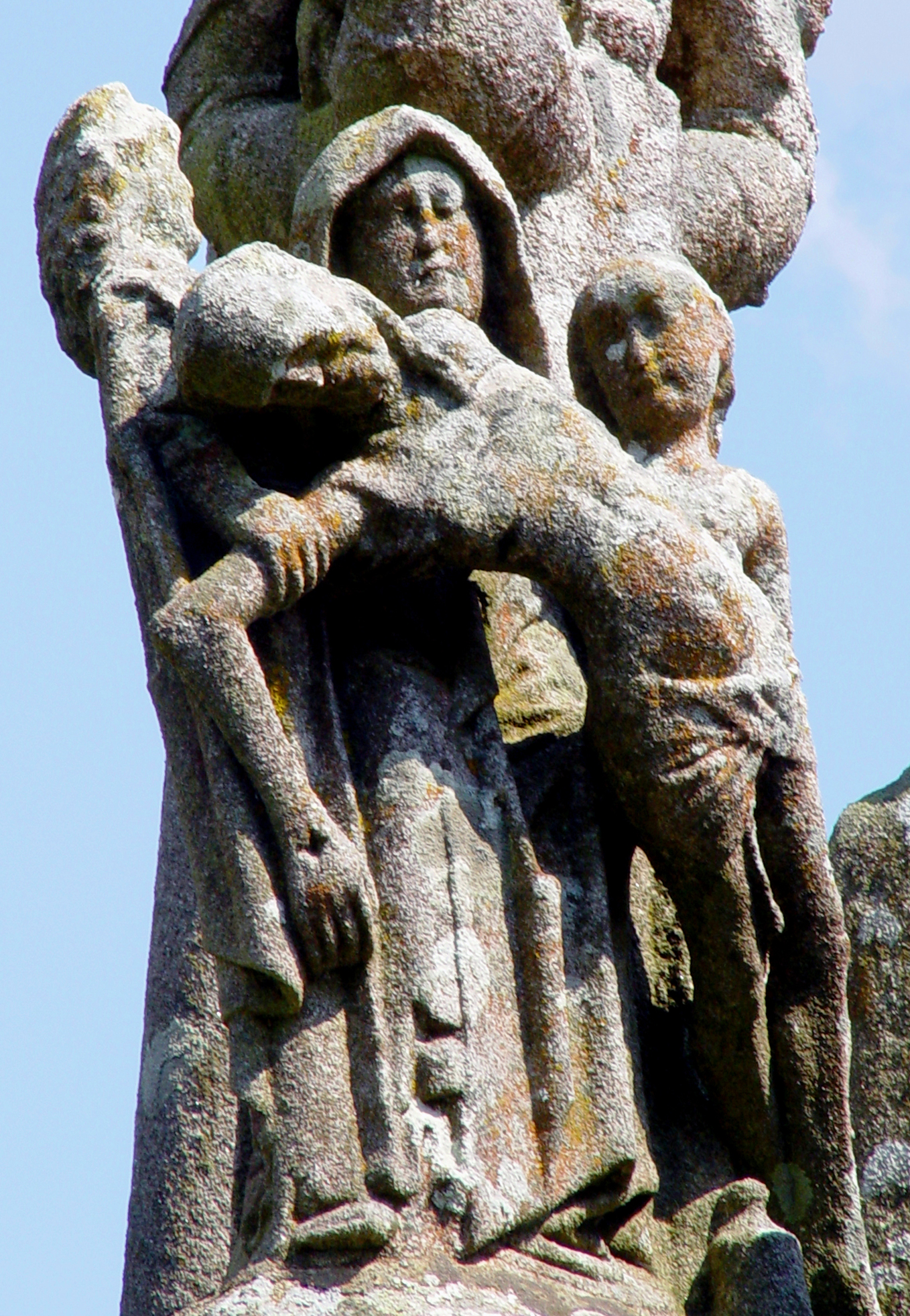 Landrévarzec (Bretagne, Finistère), calvaire Quilinen. Le calvaire de Quilinen, construit au XVIè siècle. Vierge de Pitié. .